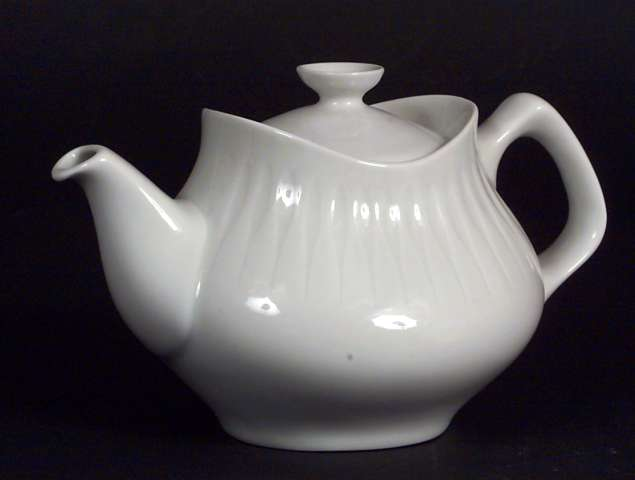 Tekanne i Spire designet av Konrad Galaaen og produsert på Porsgrunds Porselænsfabrik AS i perioden 1952-1985. Høyde 13,8 cm. Foto Anne-Lise Reinsfelt, Norsk Folkemuseum, NF.1986-0700AB.